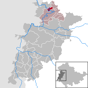 Frankenroda in Thuringia - Wartburgkreis